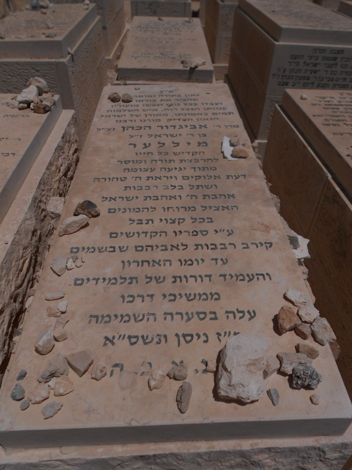 מצבתו של הרב אביגדור מילללער